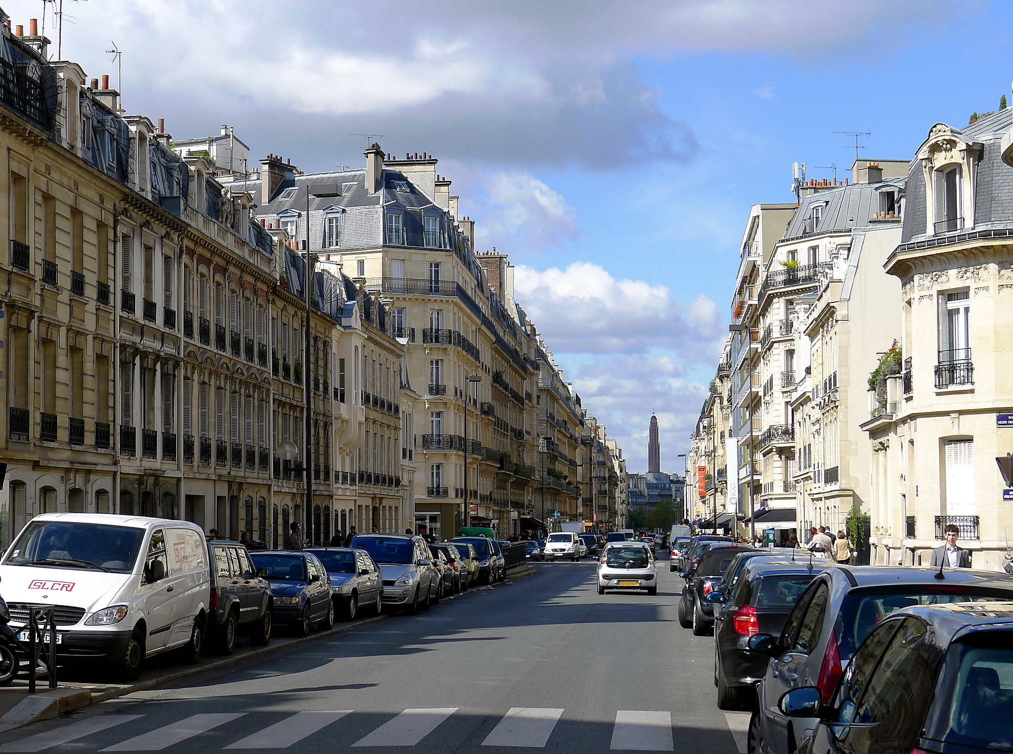 Rue de Prony - Paris XVII